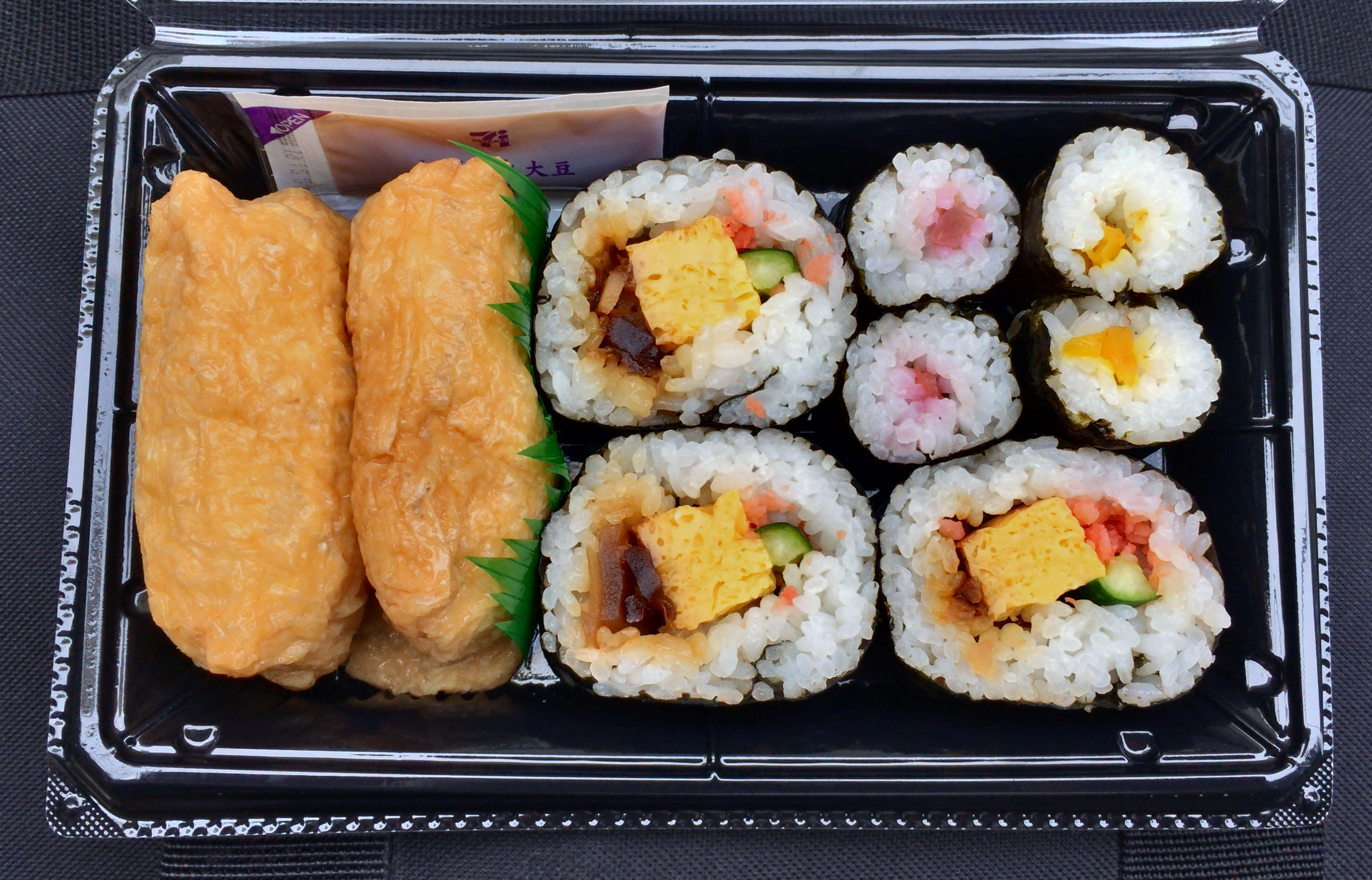 セブンイレブン 助六寿司（421円）